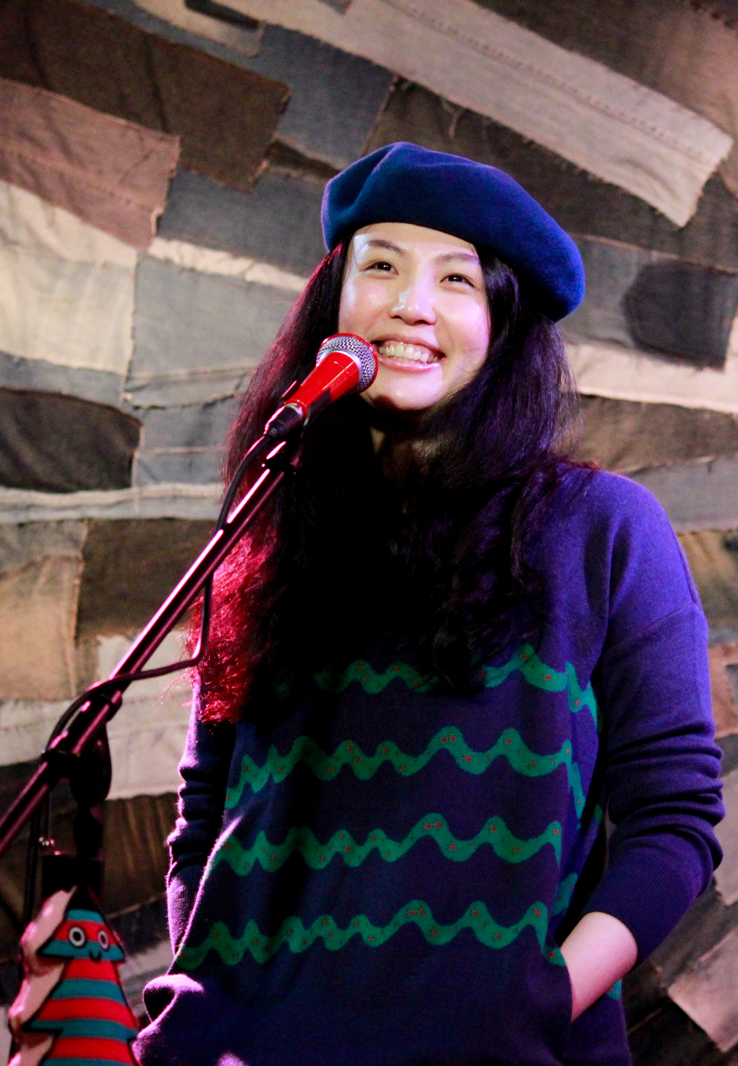 Hide&Seek小巡迴最終k打場